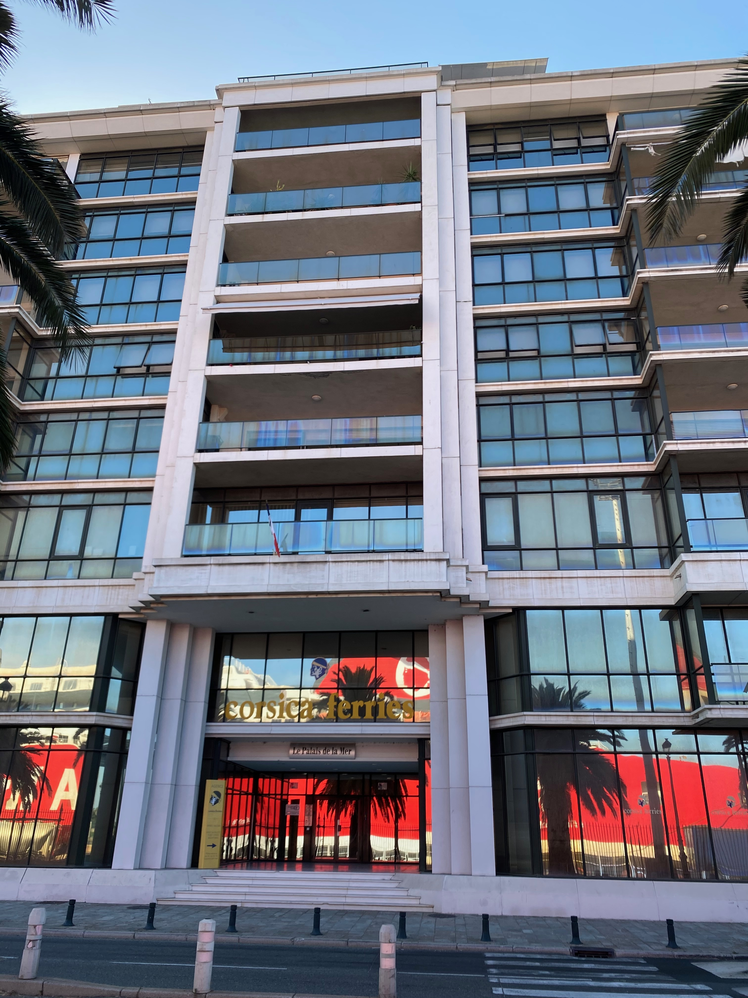 Bâtiment abritant le siège de la compagnie Corsica Ferries.